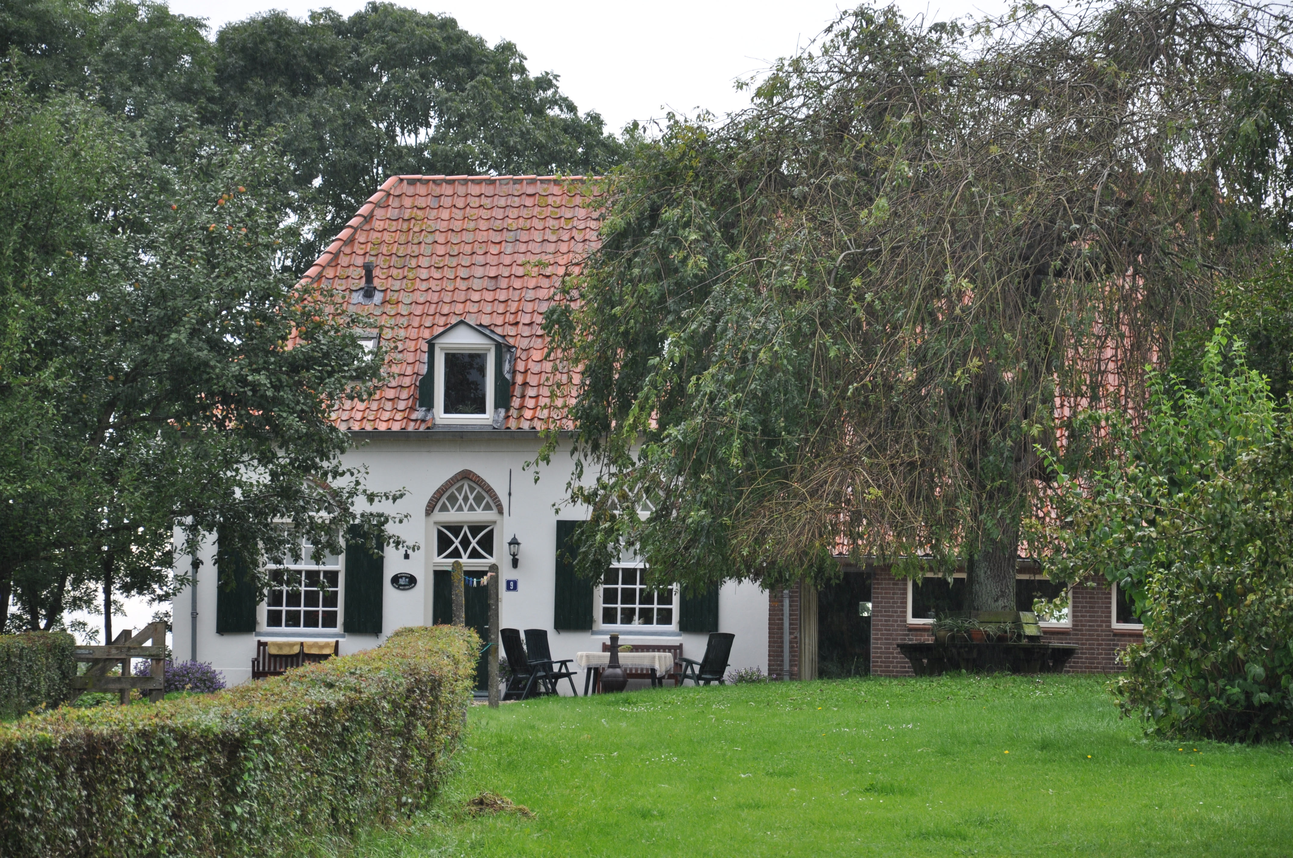 Boerderij Voorsterklei, Voorst, Gelderland.